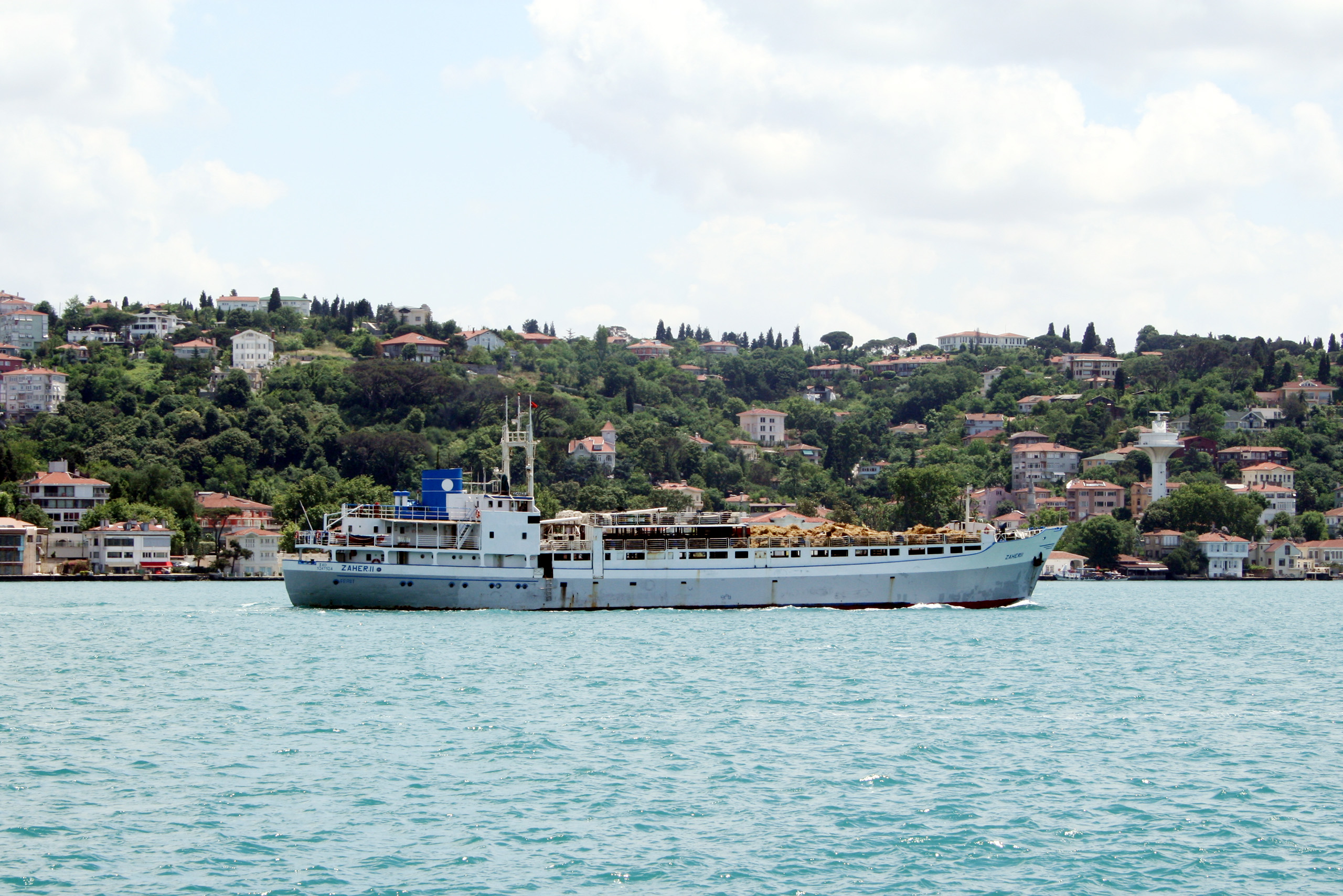 Le Zaher II (IMO : 5247524, Livestock Carriers) dans le Bosphore IMO number: 52475234